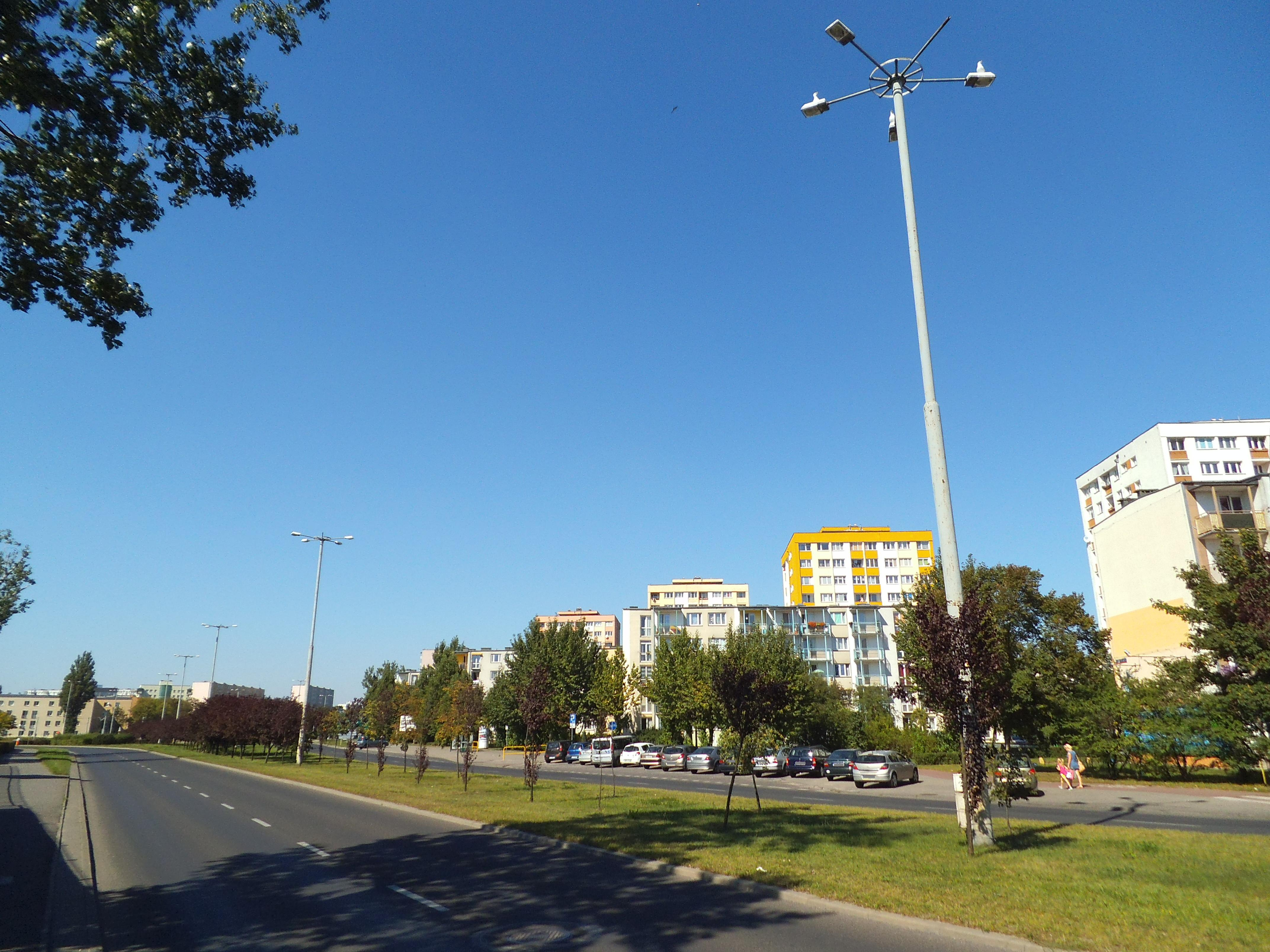 Ulica Przy Kaszowniku w Toruniu